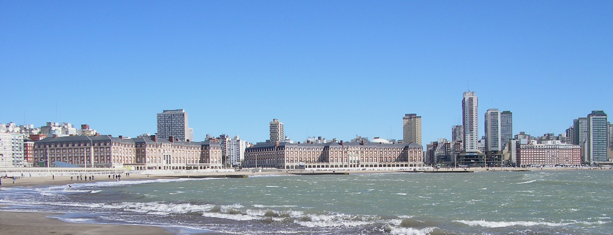 Panorámica de Mar del Plata